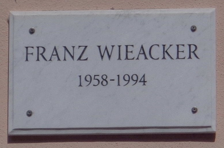 Göttinger Gedenktafel für Franz Wieacker, Jurist (1908–1994) am "Michaelishaus" in der Prinzenstraße 21.